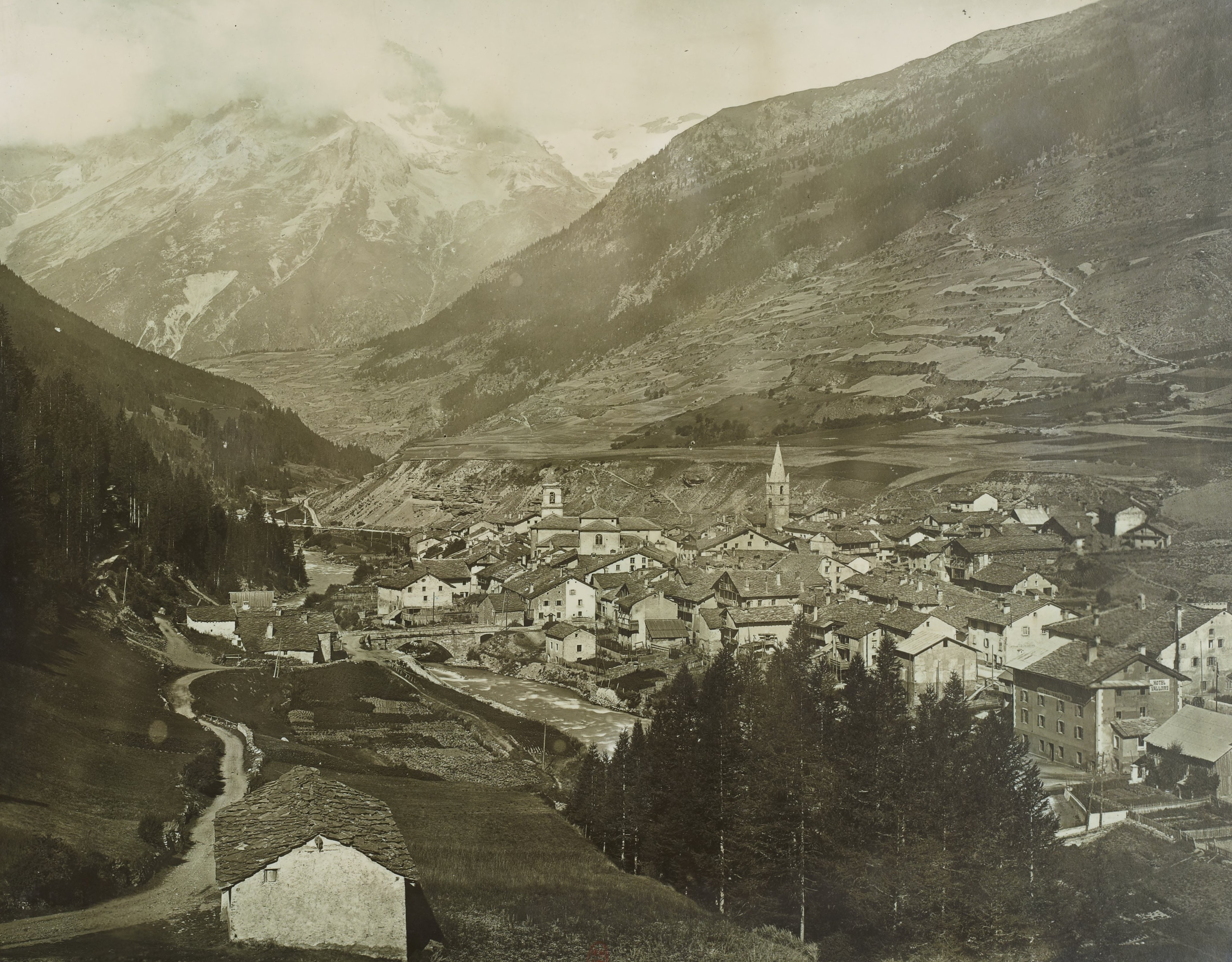 La route des Alpes : Lanslebourg et la Dent Parrachée.